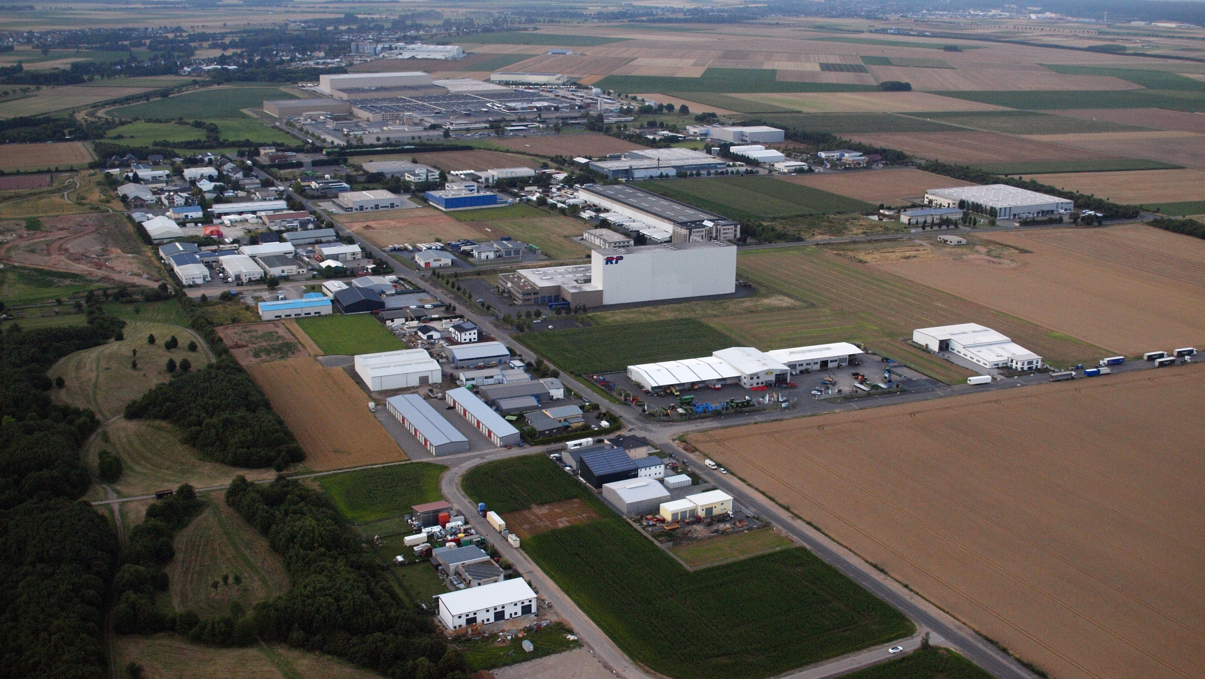 Euskirchen, Industriepark Am Silberberg, IPAS